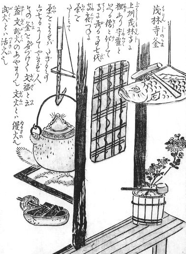 Morinji-no-kama (茂林寺釜, the tanuki teakettle) from the Konjaku Hyakki Shūi (今昔百鬼拾遺)